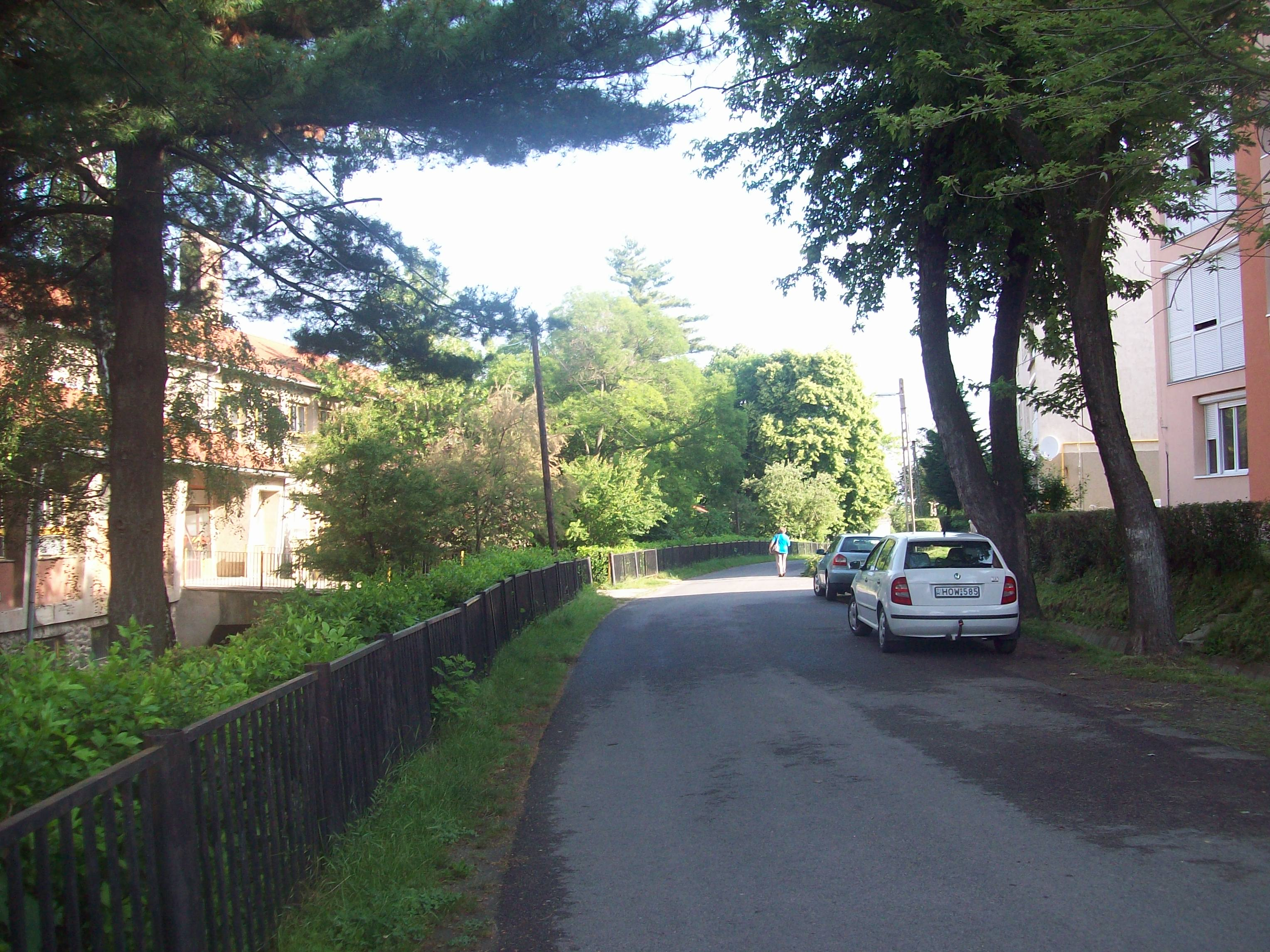 Dávidföld reggel